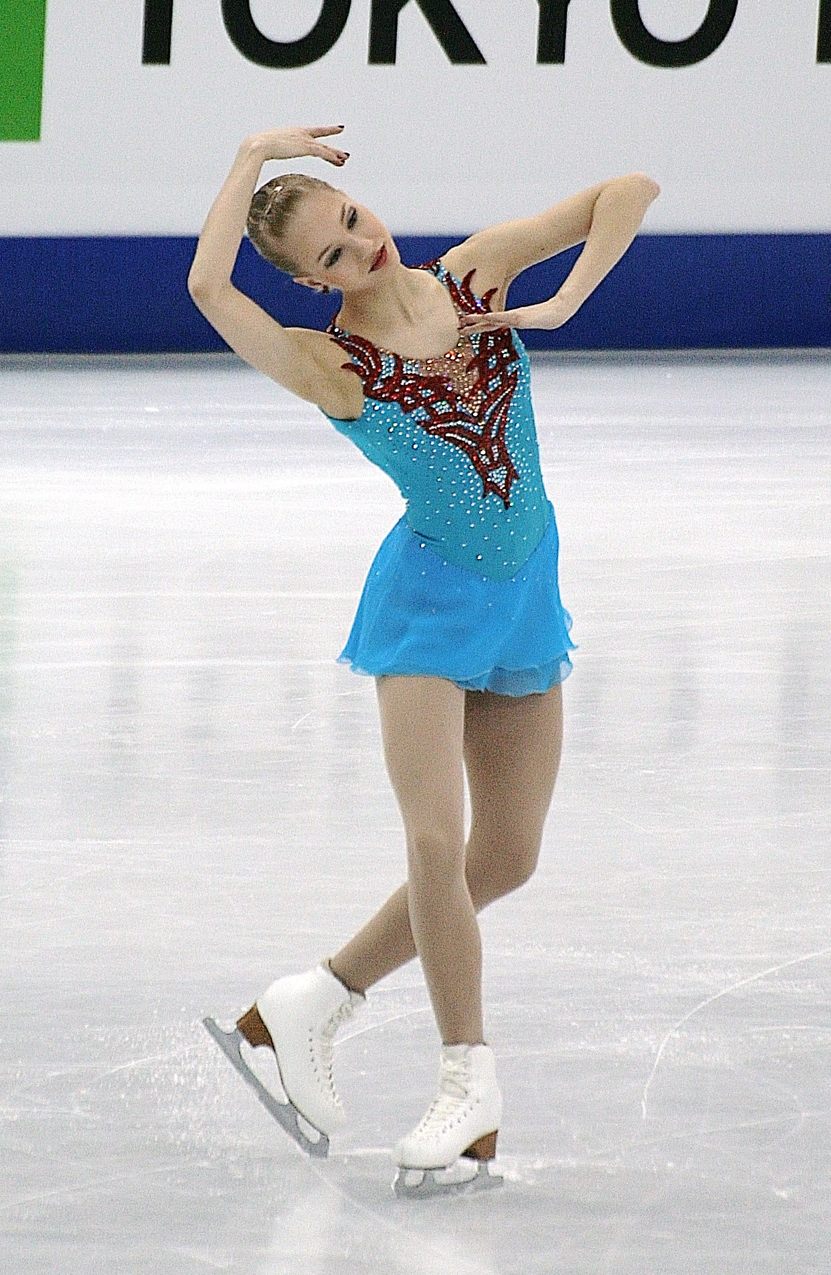 Юулия Турккила (Финляндия) на чемпионате мира по фигурному катанию 2012